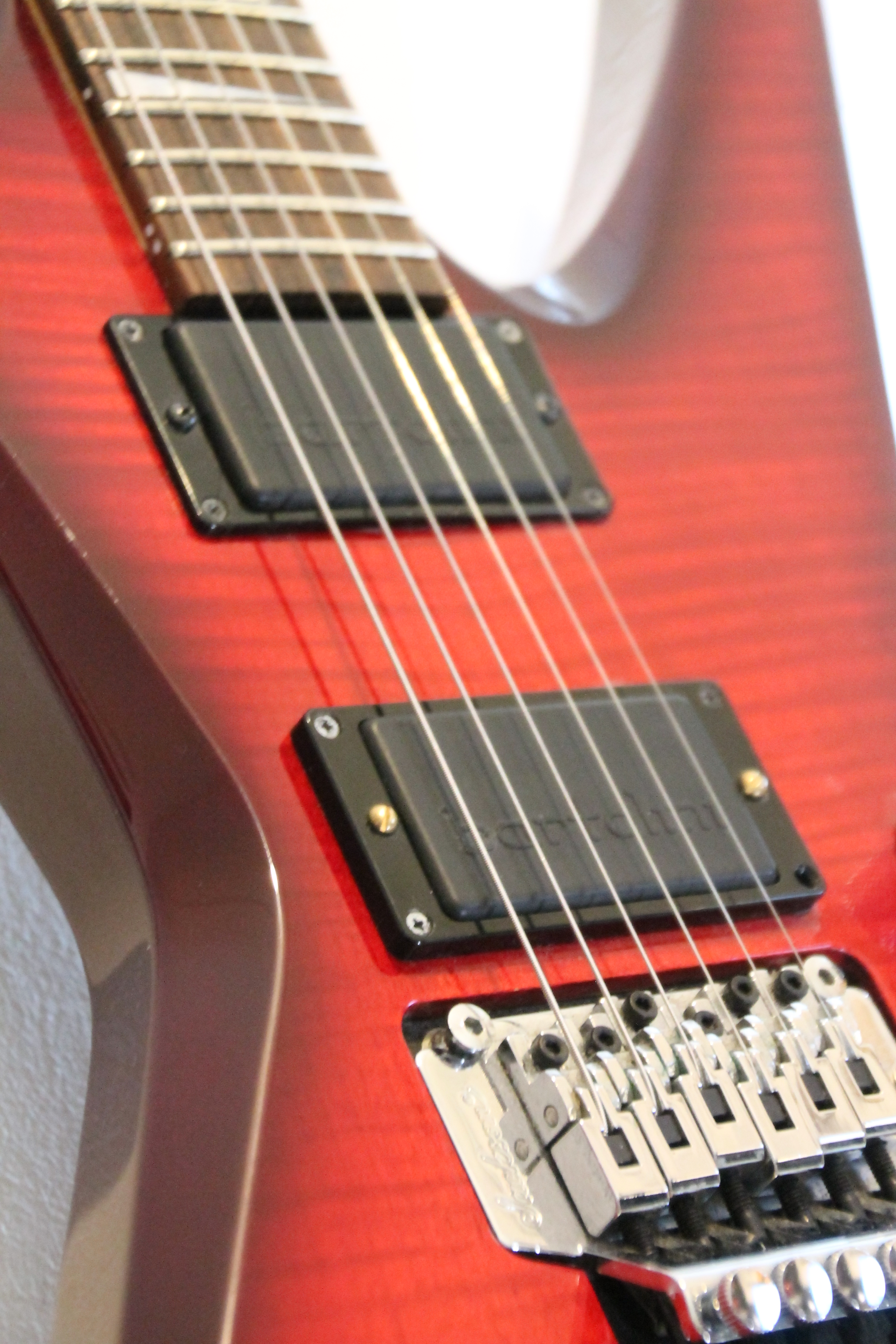 Bartolini E-90D (talla) ja E-88D (kaula) -aktiiviset kitaramikrofonit.